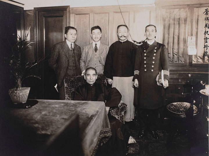 1924年11月22日，孙中山携宋庆龄等一行乘“上海丸”离沪，取道日本转赴北京。图为孙中山在由沪赴日船中。中坐者为孙中山，站立者左2戴季陶、左3李烈钧。该照片原由当时在日本长崎医科大学留学的周枕云珍藏，周枕云原籍云南大理，所以照片上有“苍洱周枕云珍藏”的字样。